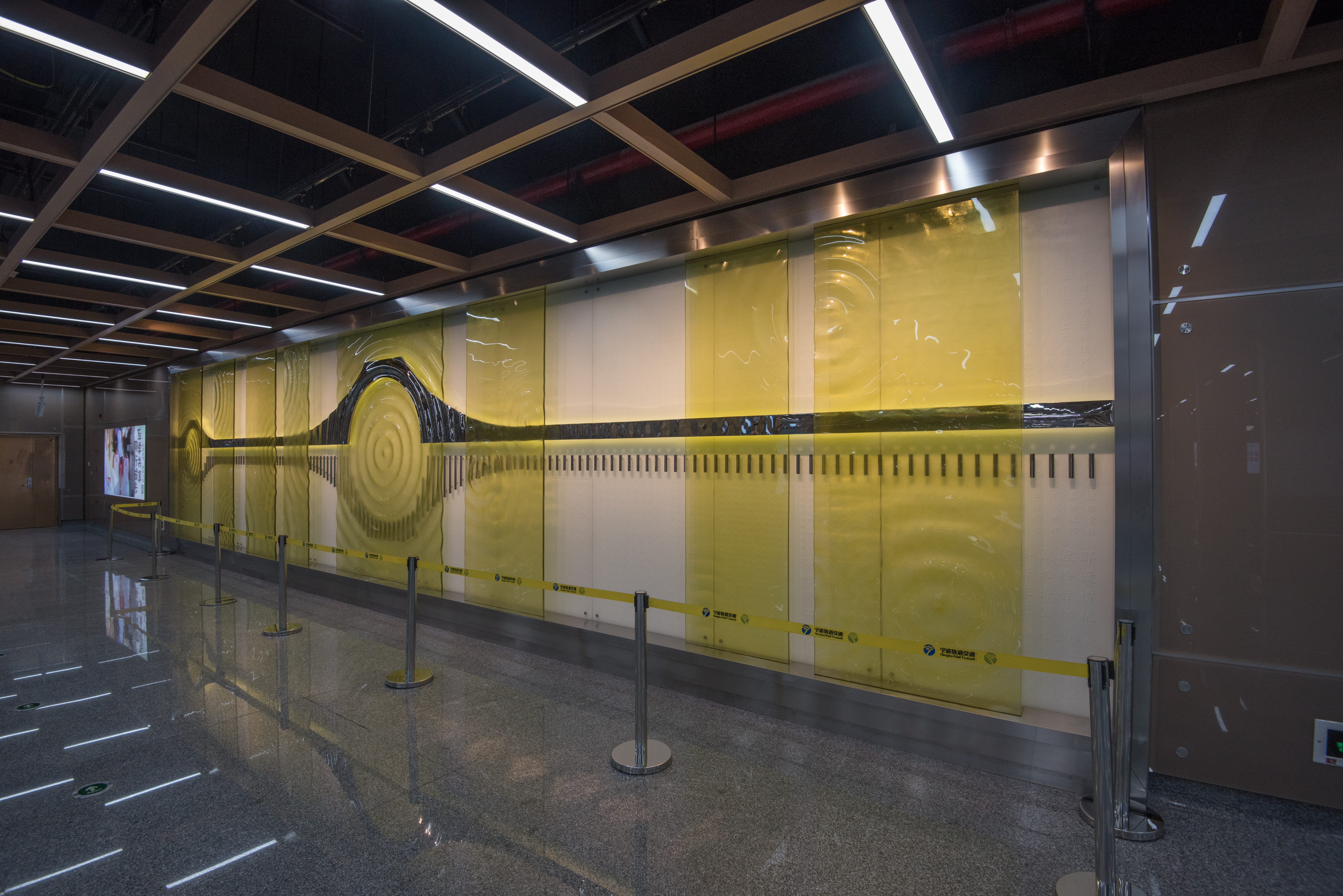 宁波地铁大通桥站艺术墙“水韵”